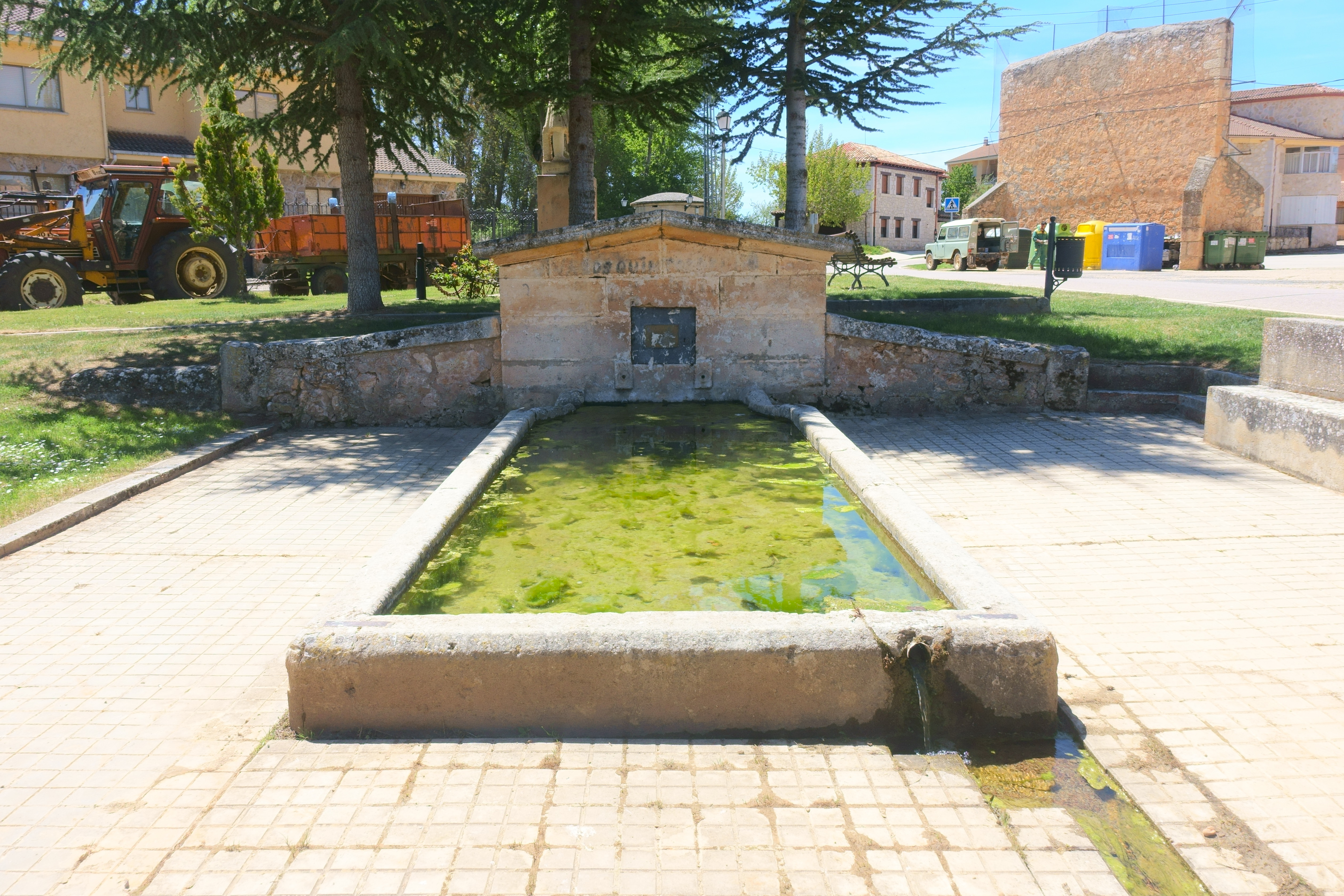 Pilón en Aldehorno (Segovia, España).